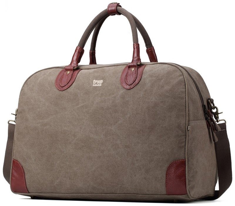 Palubní taška je další možností jak převážet své osobní věci na palubě letadla. Jako dvě předchozí zavazadla je